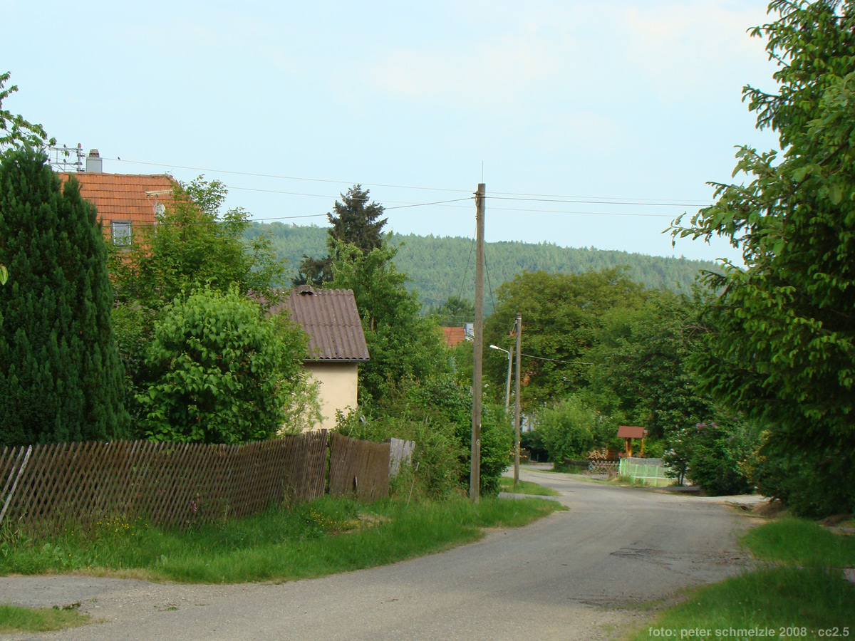 Straßenszene in Neckargerach-Lauerskreuz